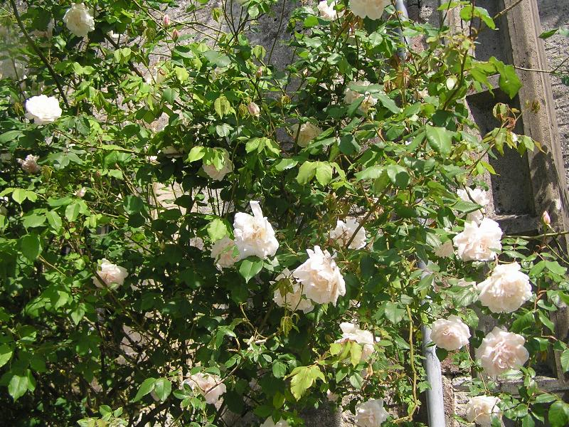 Rosa Mme Alfred Carriere